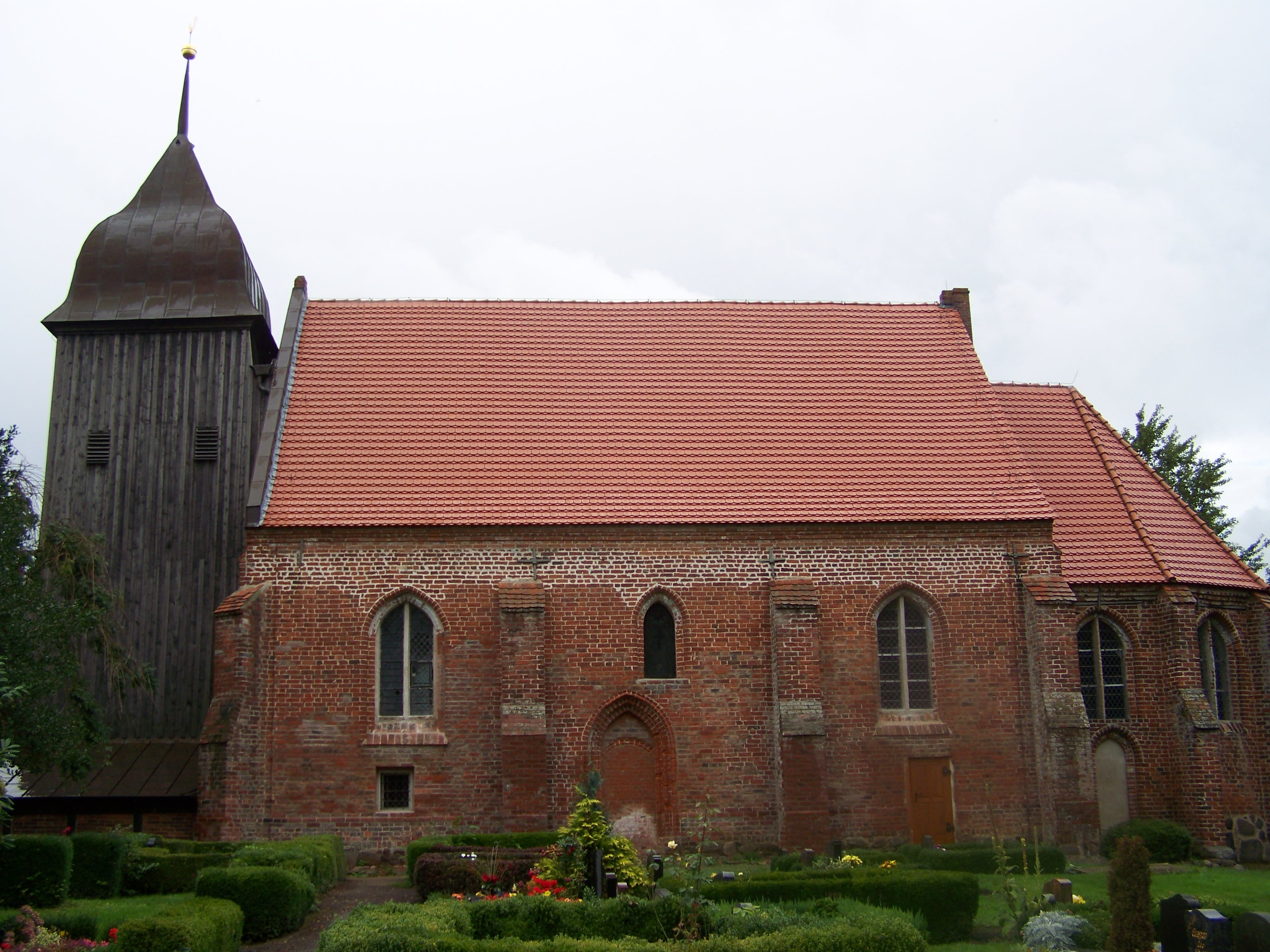 Zudar, St.-Laurentius-Kirche